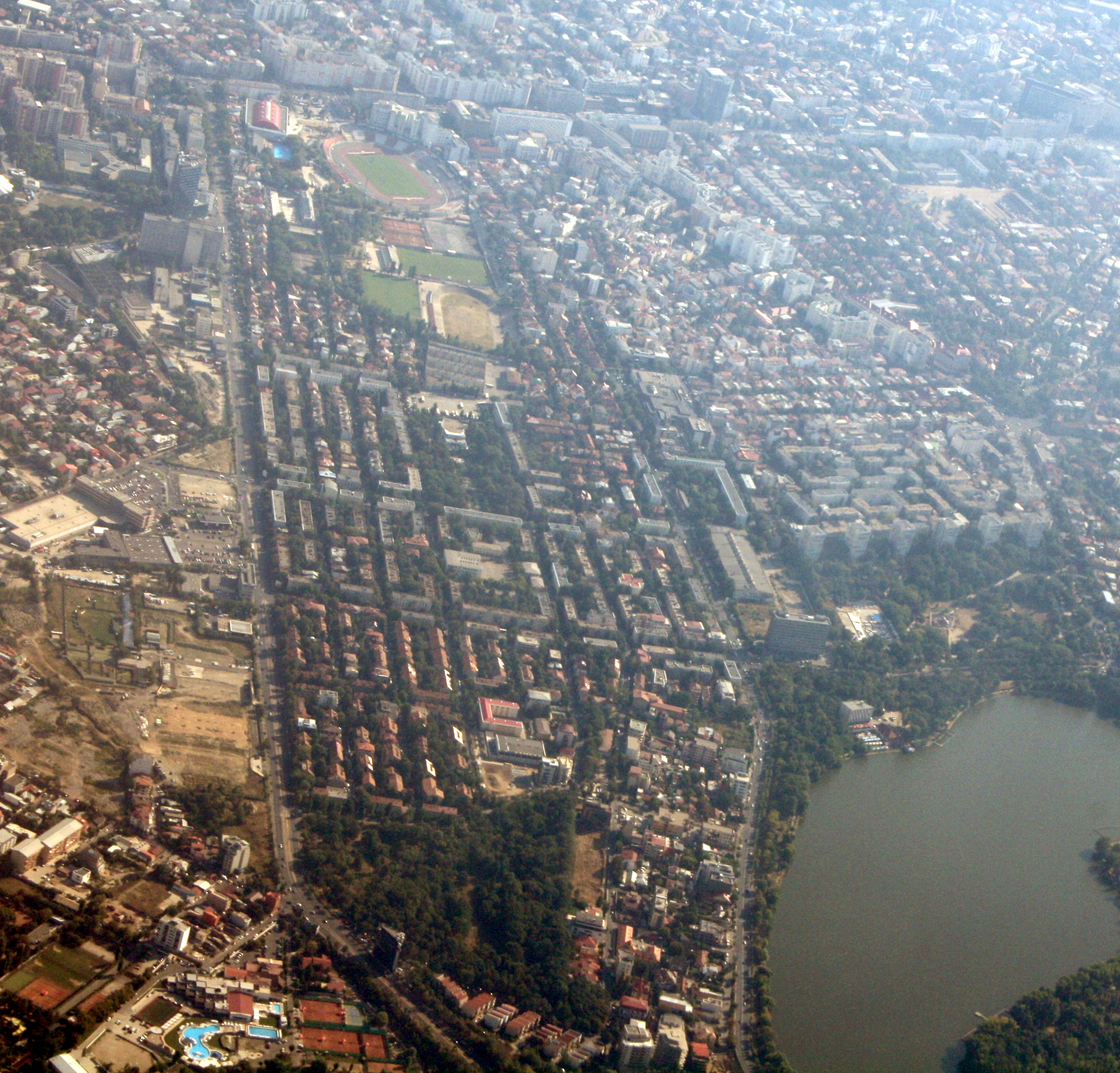 Floreasca, Bucharest, aerial view